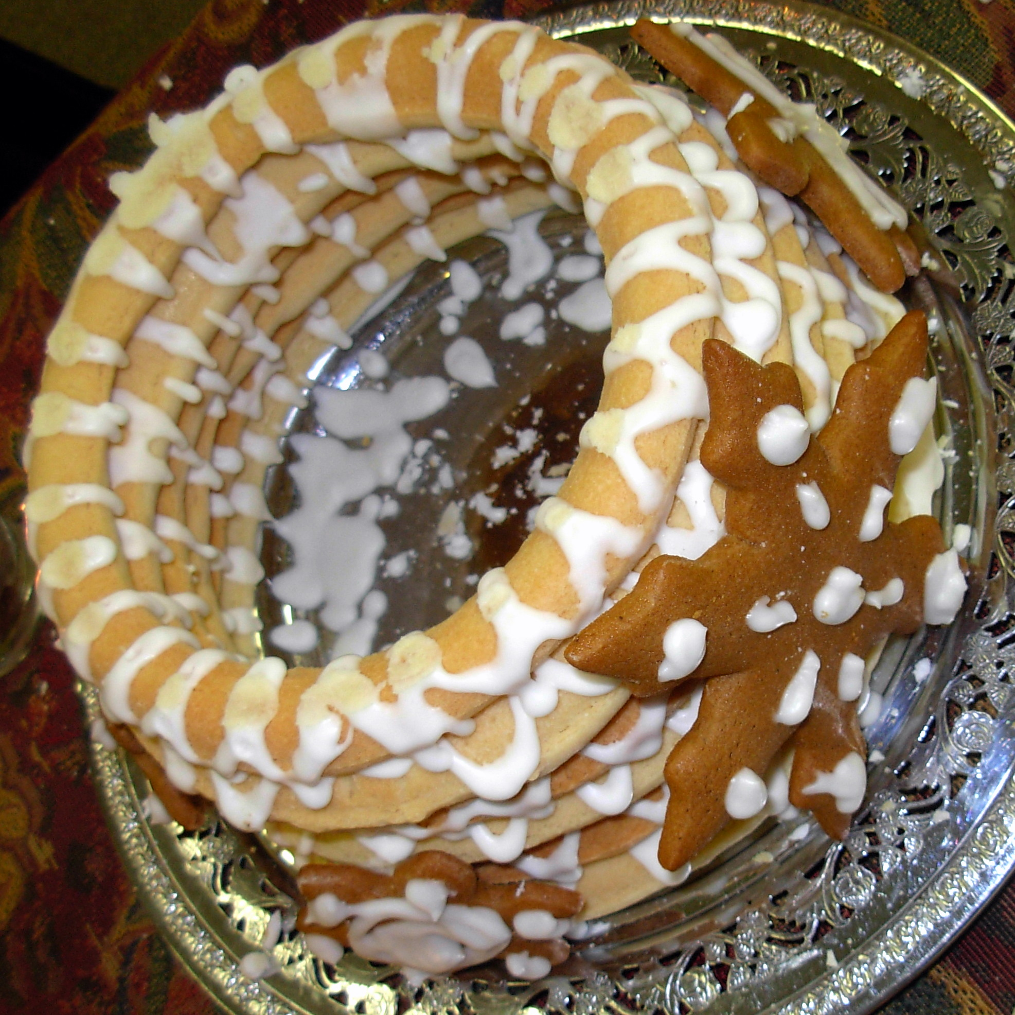 Kransekake dessert